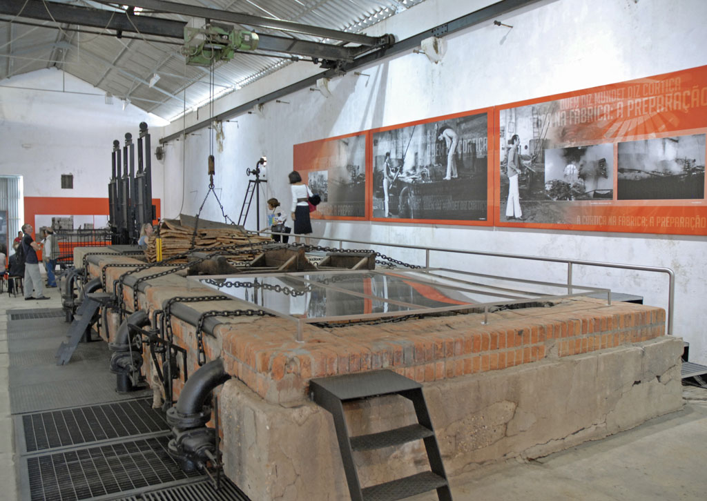 Seixal est une ville de 31.000 habitants située dans le district de Setubal, sur les bords du Tage, à 20 Km de Lisbonne. L'écomusée de Seixal étudie et valorise le patrimoine maritime et industriel de la région à travers l'aménagement de sites et d'espaces d'interprétation. Son siège se trouve dans les locaux de l'ancienne usine de liège Mundet.